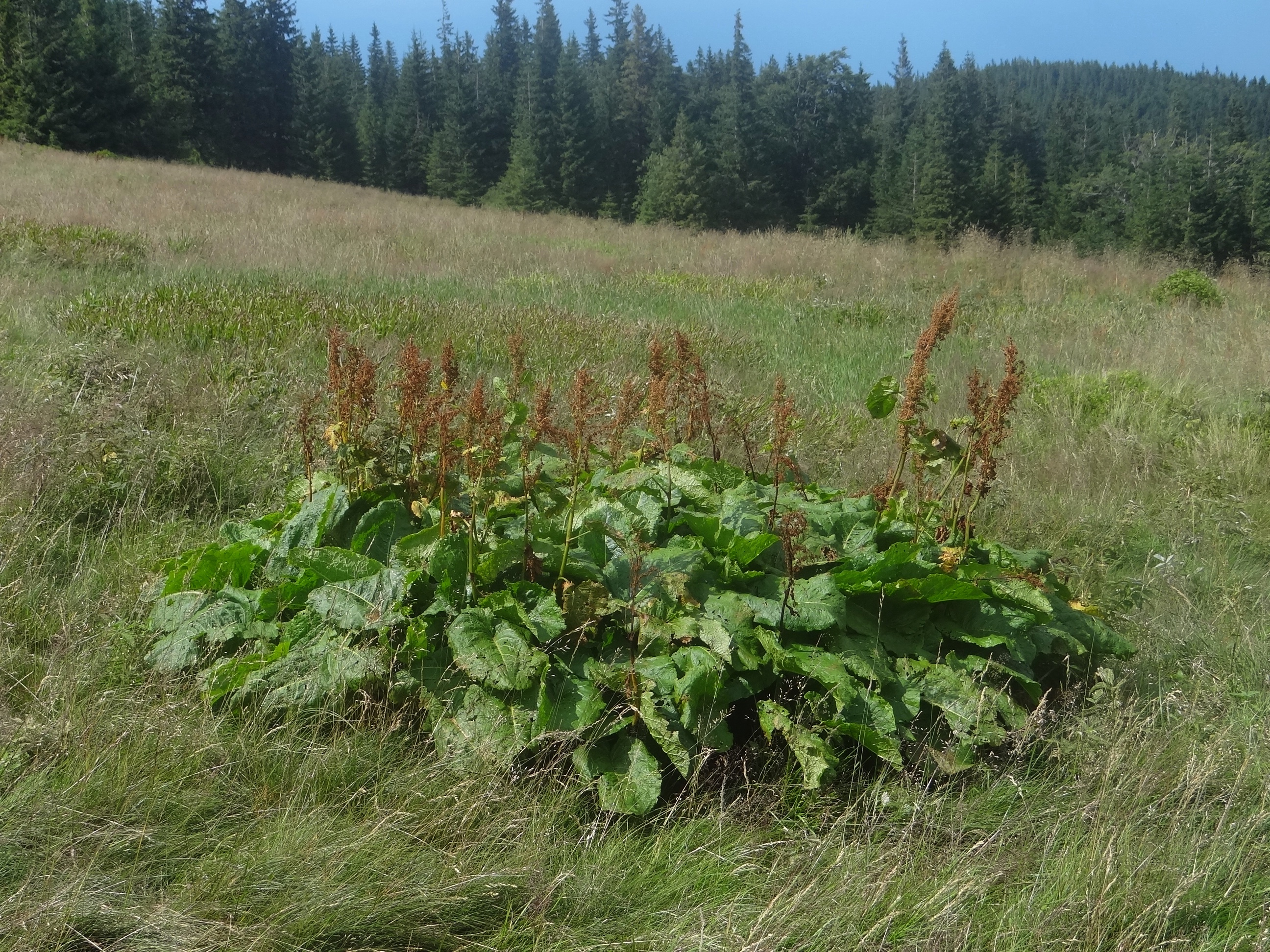 Rumex alpinus (Hala Jodłowcowa, Beskid Żywiecki)